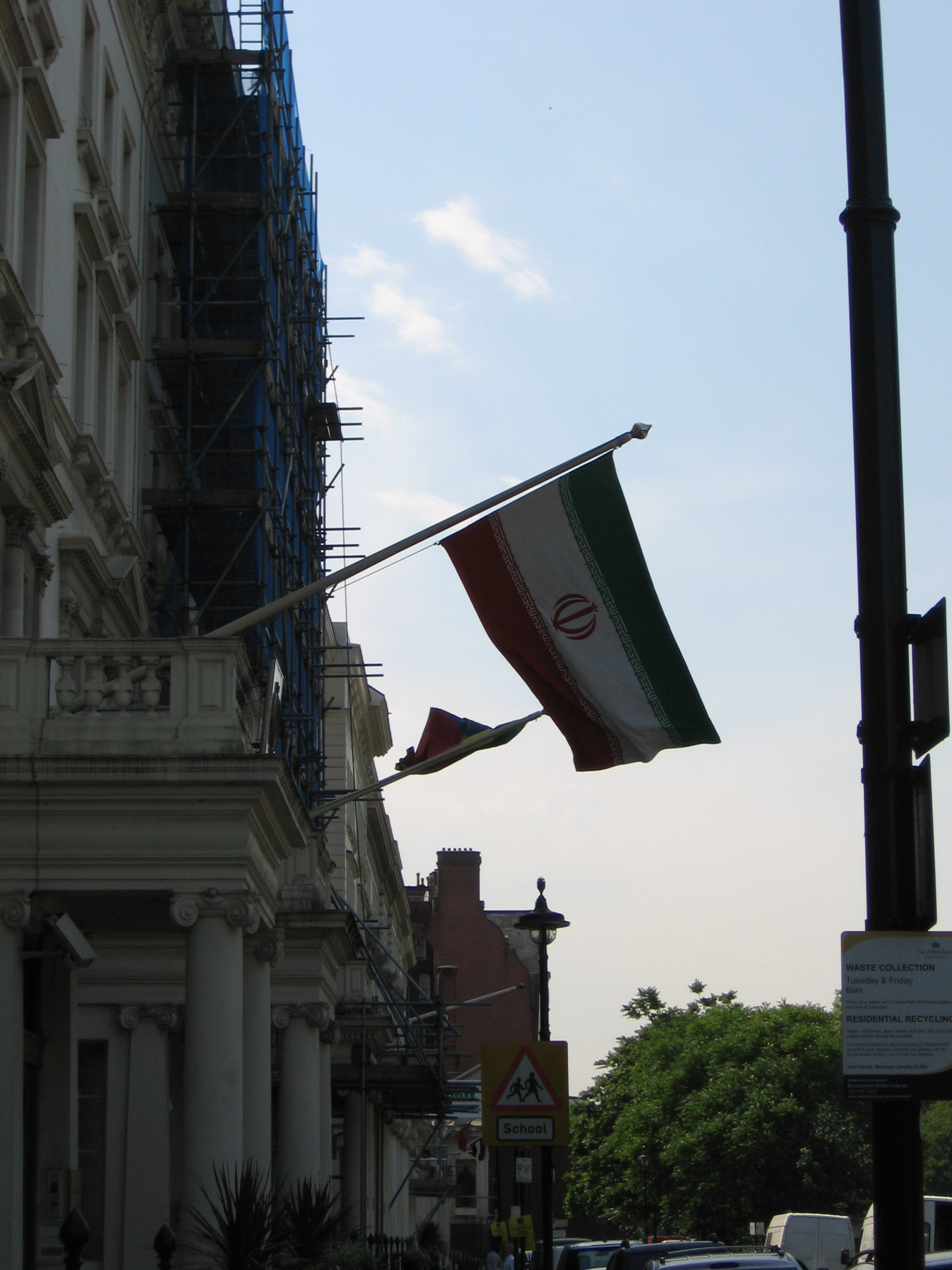 Ambassade d'Iran à Londres